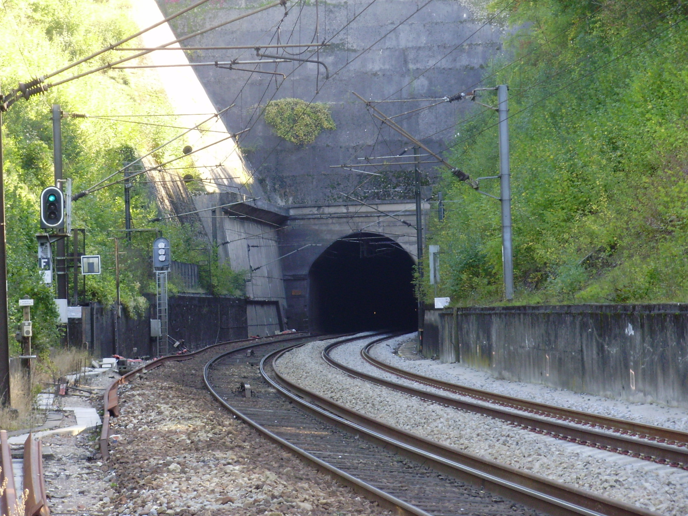 Tunnel de Rolleboise, entrée nord-ouest, à Freneuse, Yvelines, France